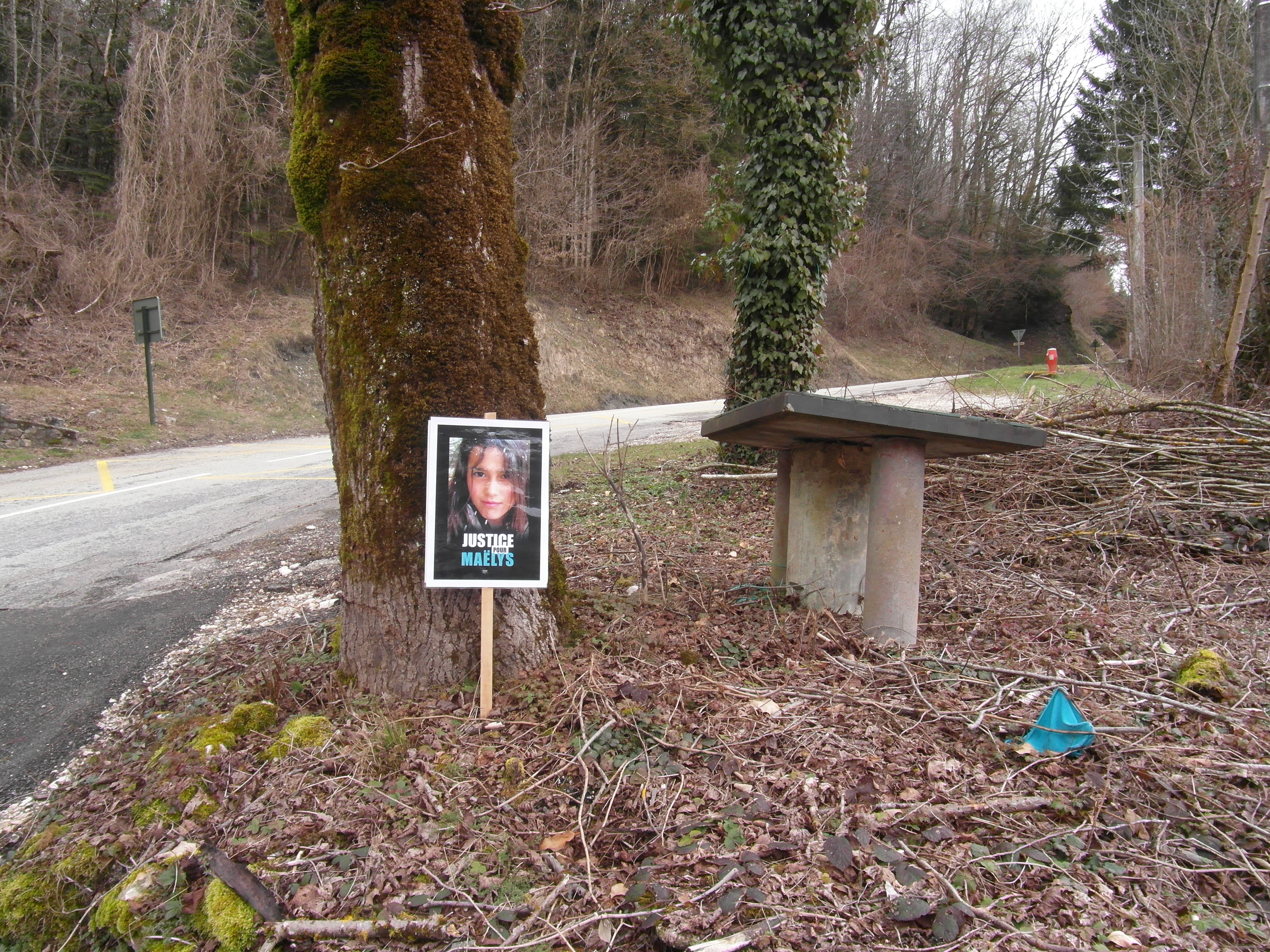 Début de la RD 39 à Saint-Franc avec le portrait de Maëlys